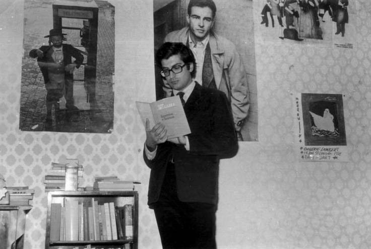 Dario Bellezza Il poeta italiano Dario Bellezza (1944-1996) nel 1971, mentre legge Invettive e licenze. Foto di Massimo Consoli.